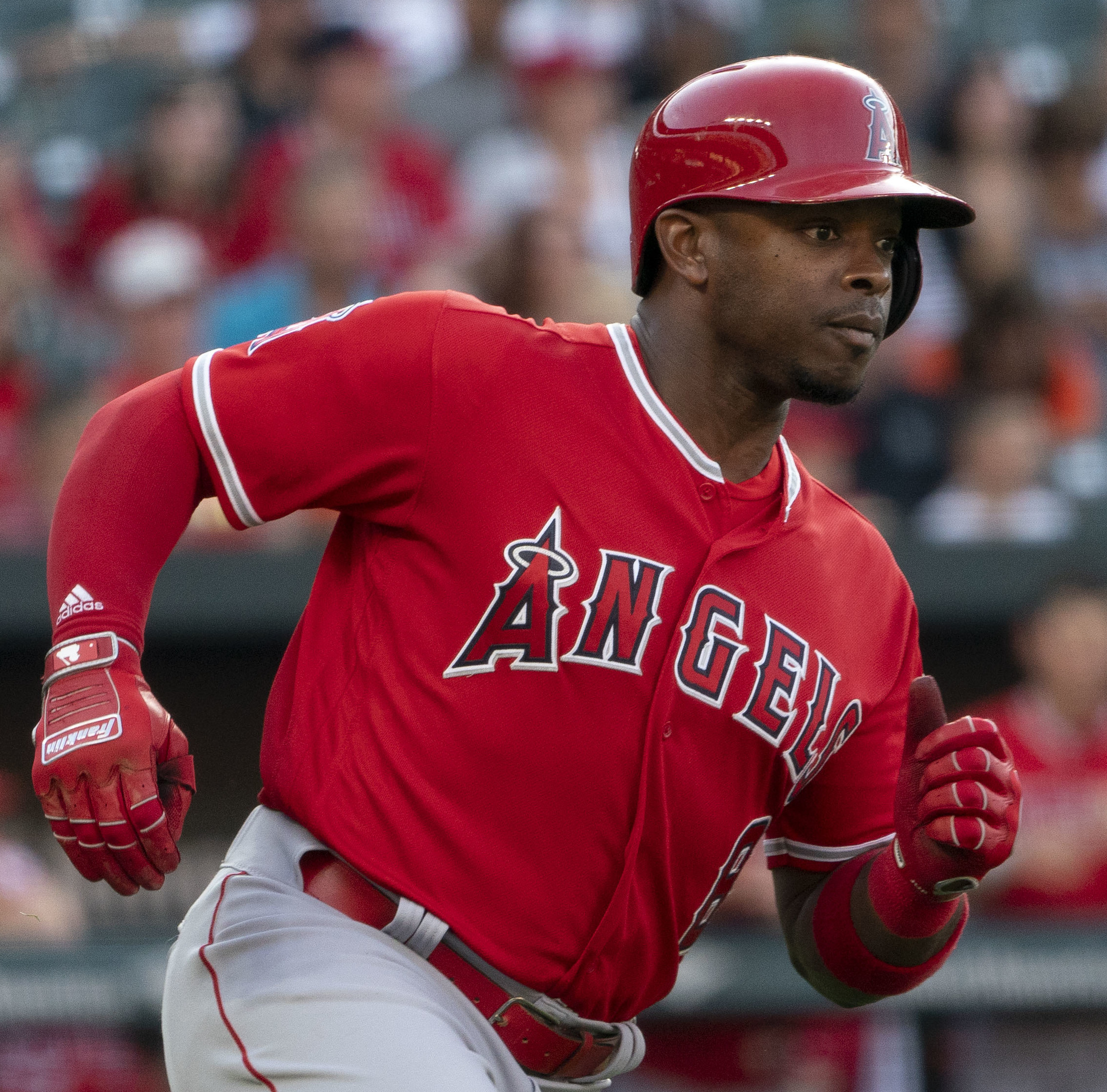 Angels at Orioles 6/29/18